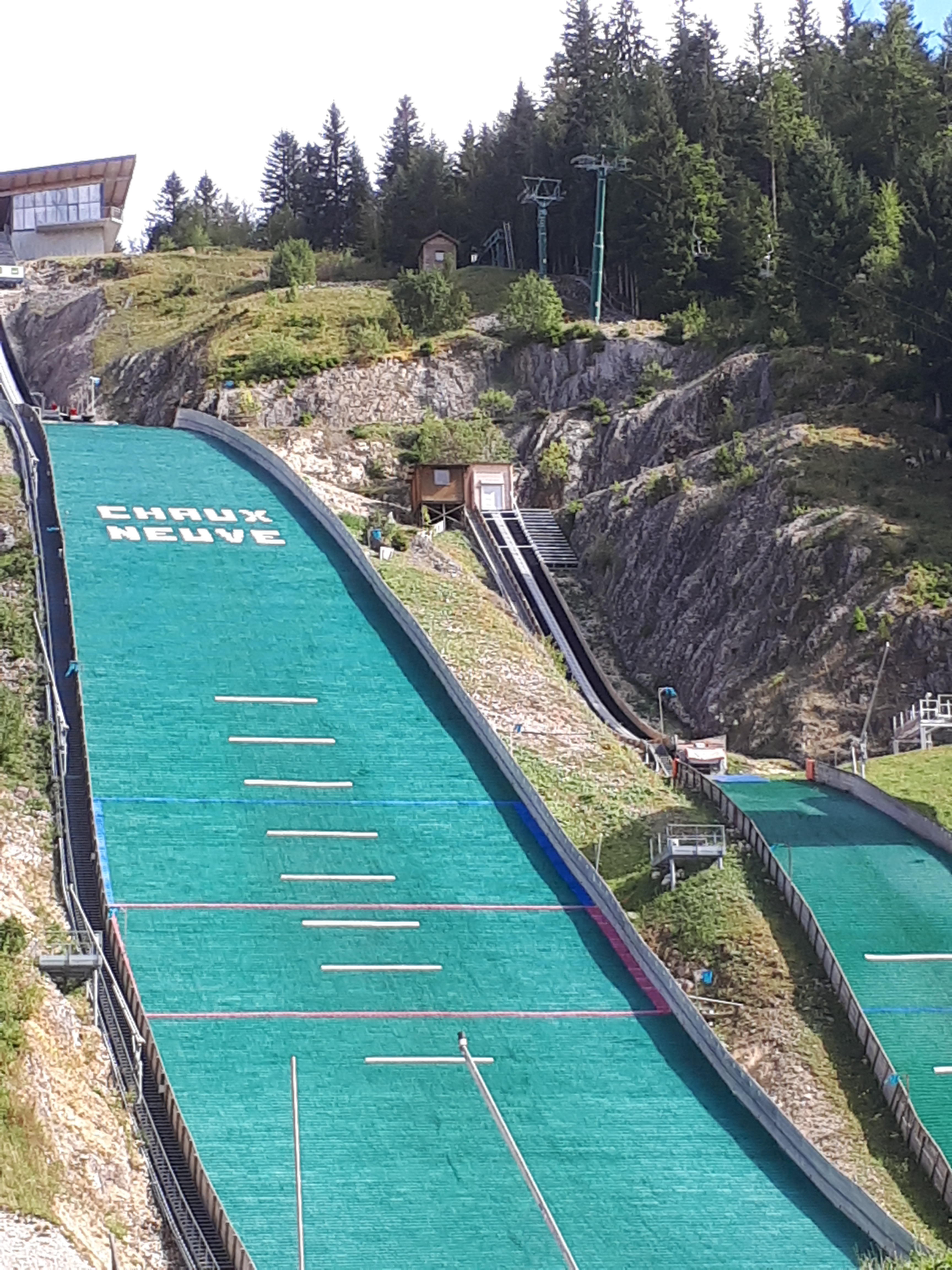 Stade de La Côte Feuillée à Chaux-Neuve. L'aire d'atterrissage synthétique du grand tremplin.